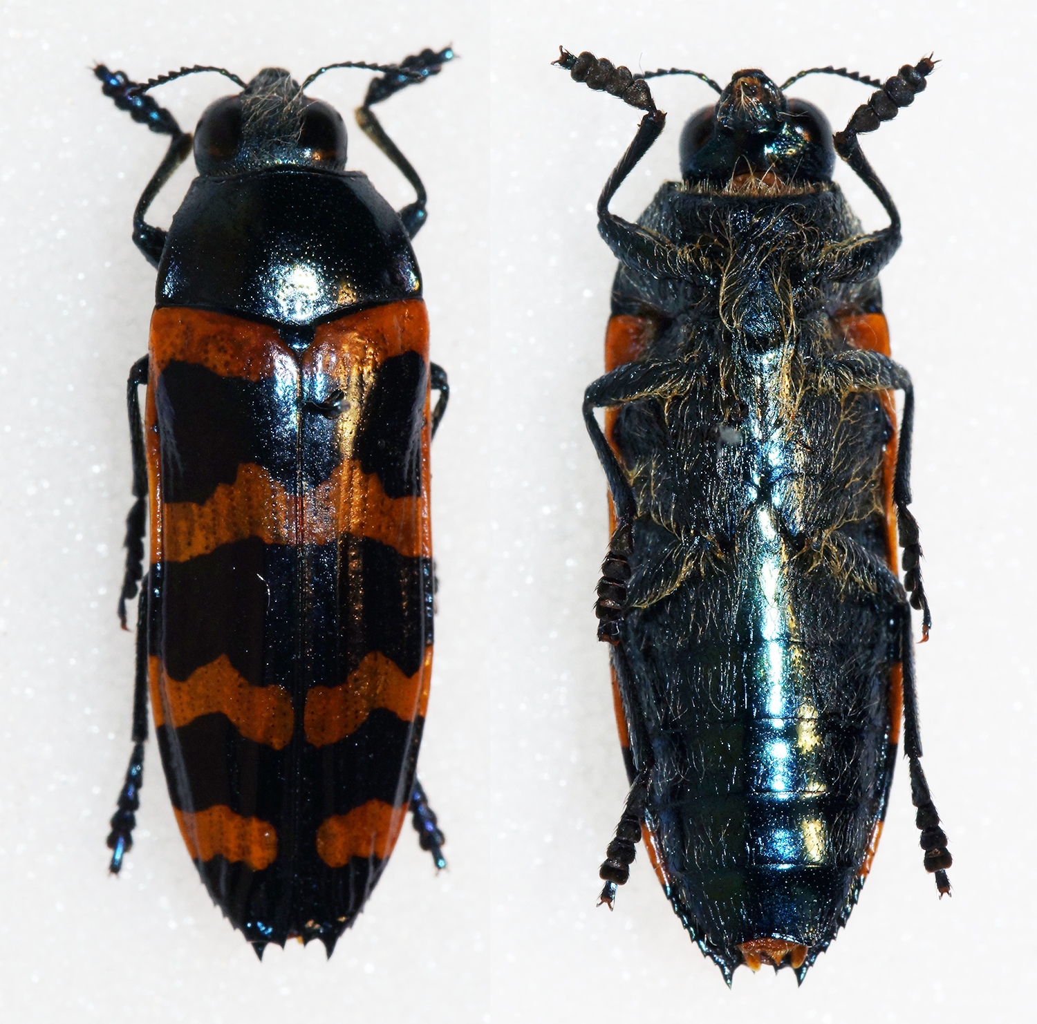 Cobos,1967 Sex: ? Data: 06-11-12 - Tibagi - Parana - Brazil Size: 16.5mm